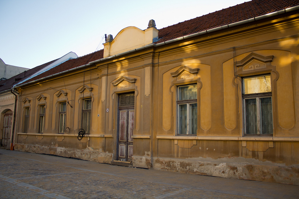 Strada Andrei Șaguna, mitropolit 9, Alba Iulia, interiorul Cetății Alba Carolina